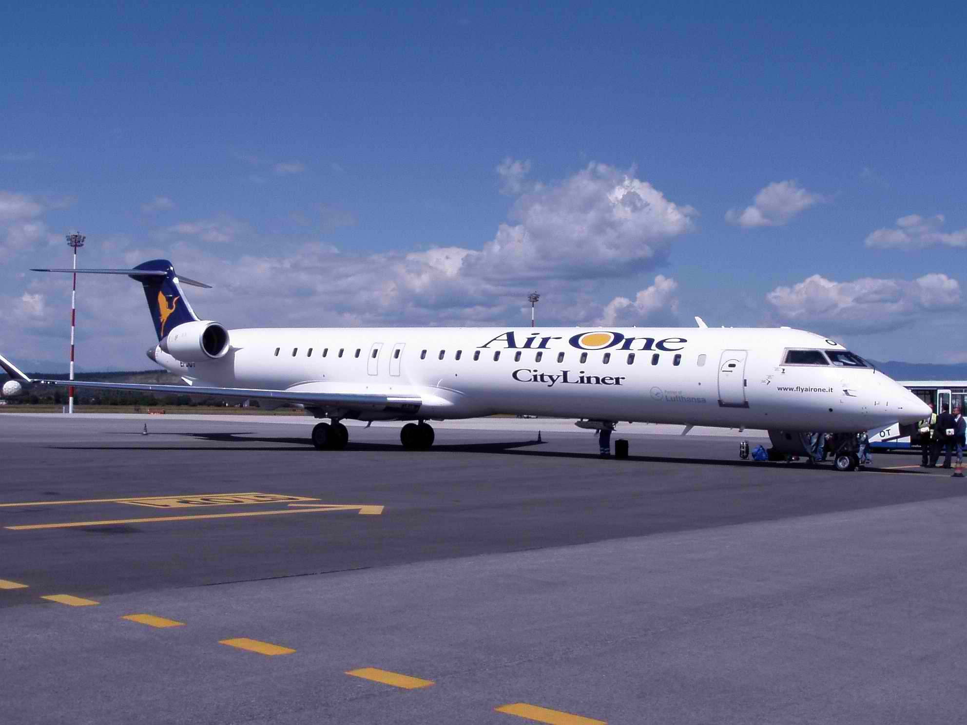 Air One CityLiner CRJ900 (EI-DOT). Mat, foto Mat, aereo, jfdl